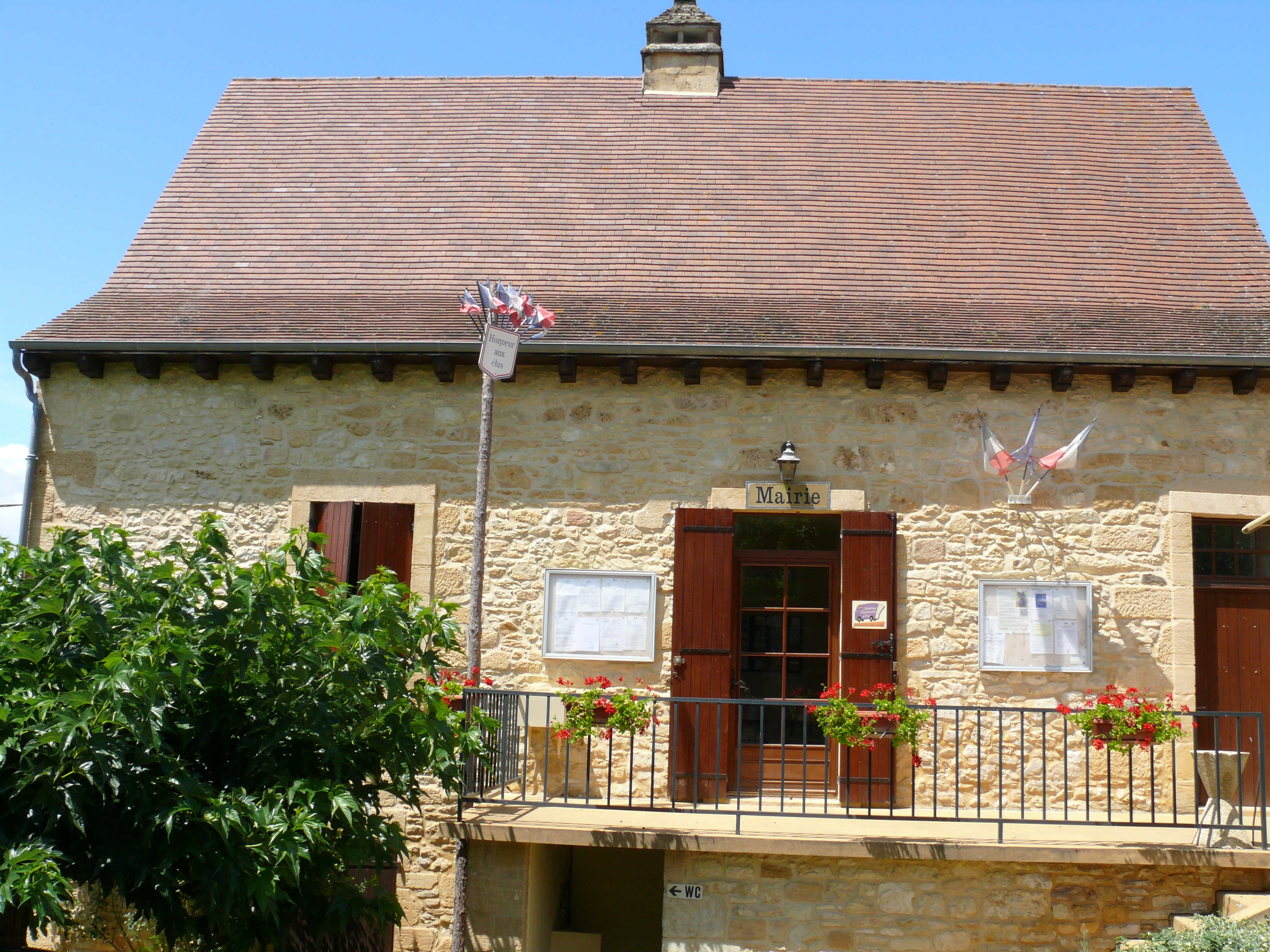 Campagnac-lès-Quercy - Mairie